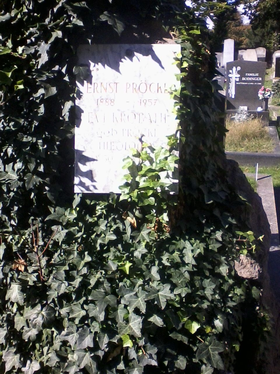 Ernst Pröckl Grabstätte